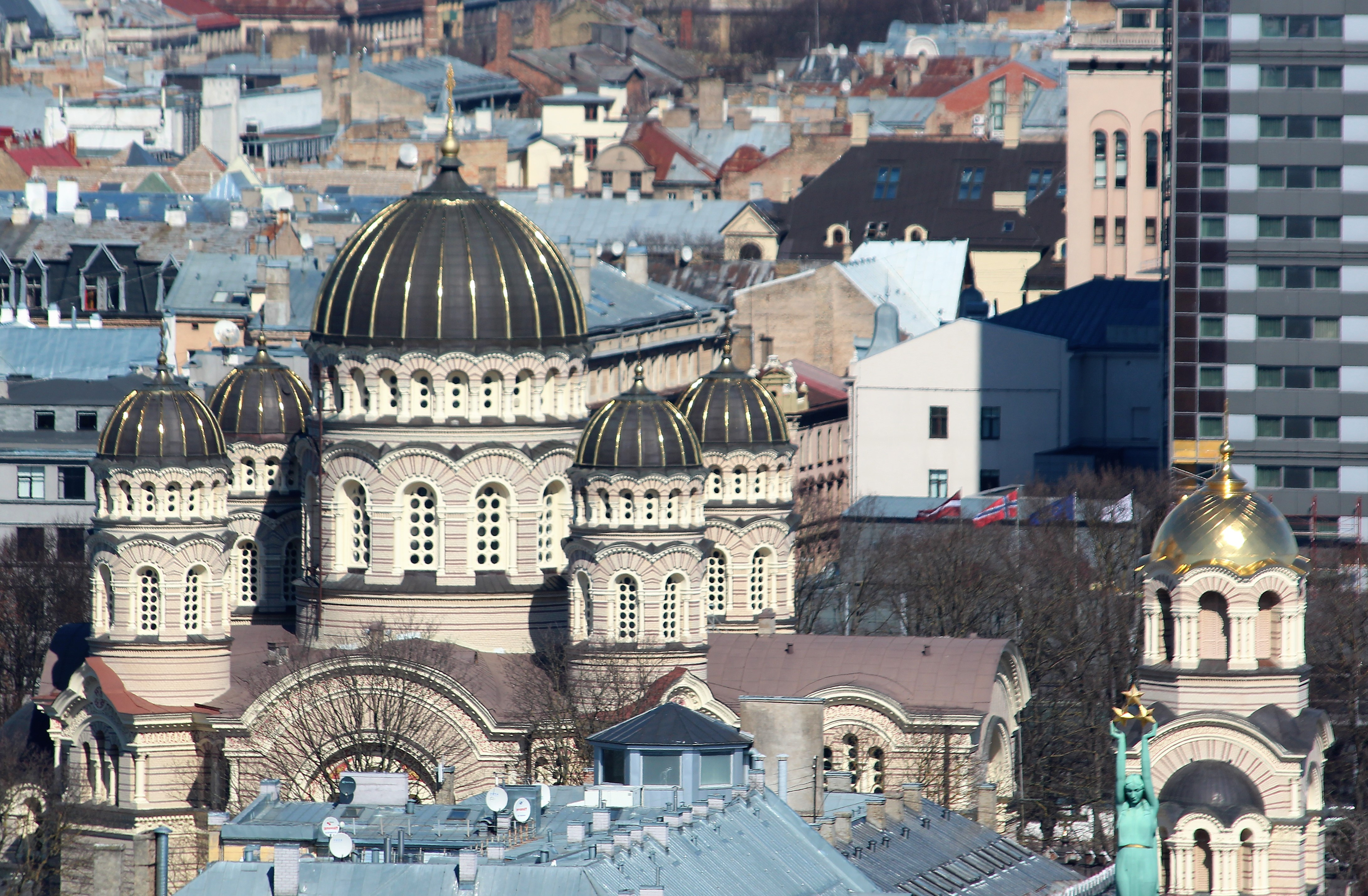 Ortodoksinen Kristuksen syntymän katedraali Pyhän Pietarin kirkon tornista nähtynä.